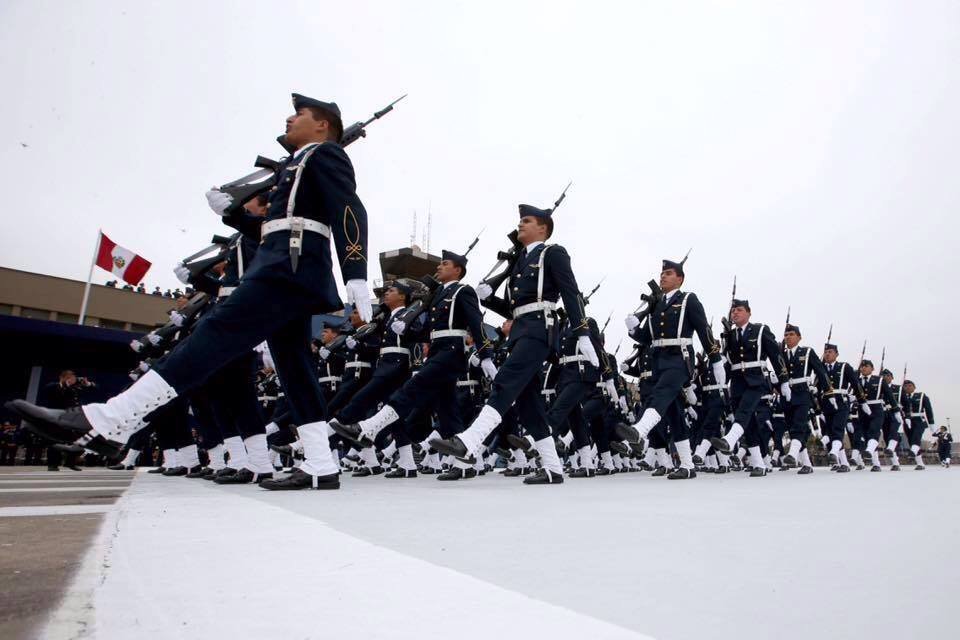 Ceremonia de fin de año.